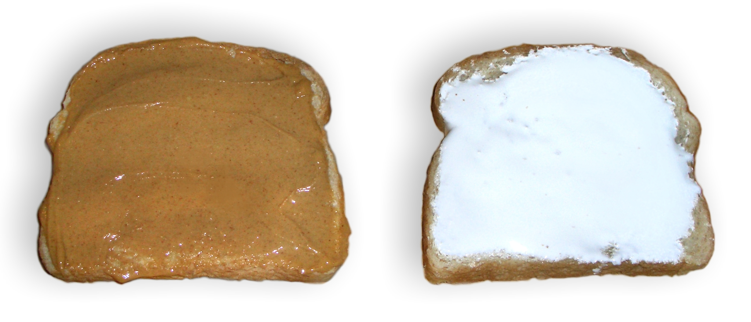 Fluffernutter before putting together.